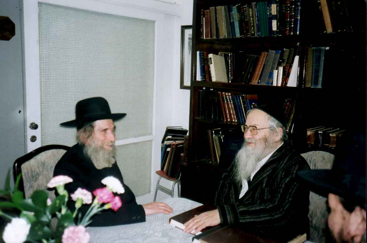 עם הרב שטיינמן ובנו הרב דוד יצחק שפירא בביתו בבאר יעקב